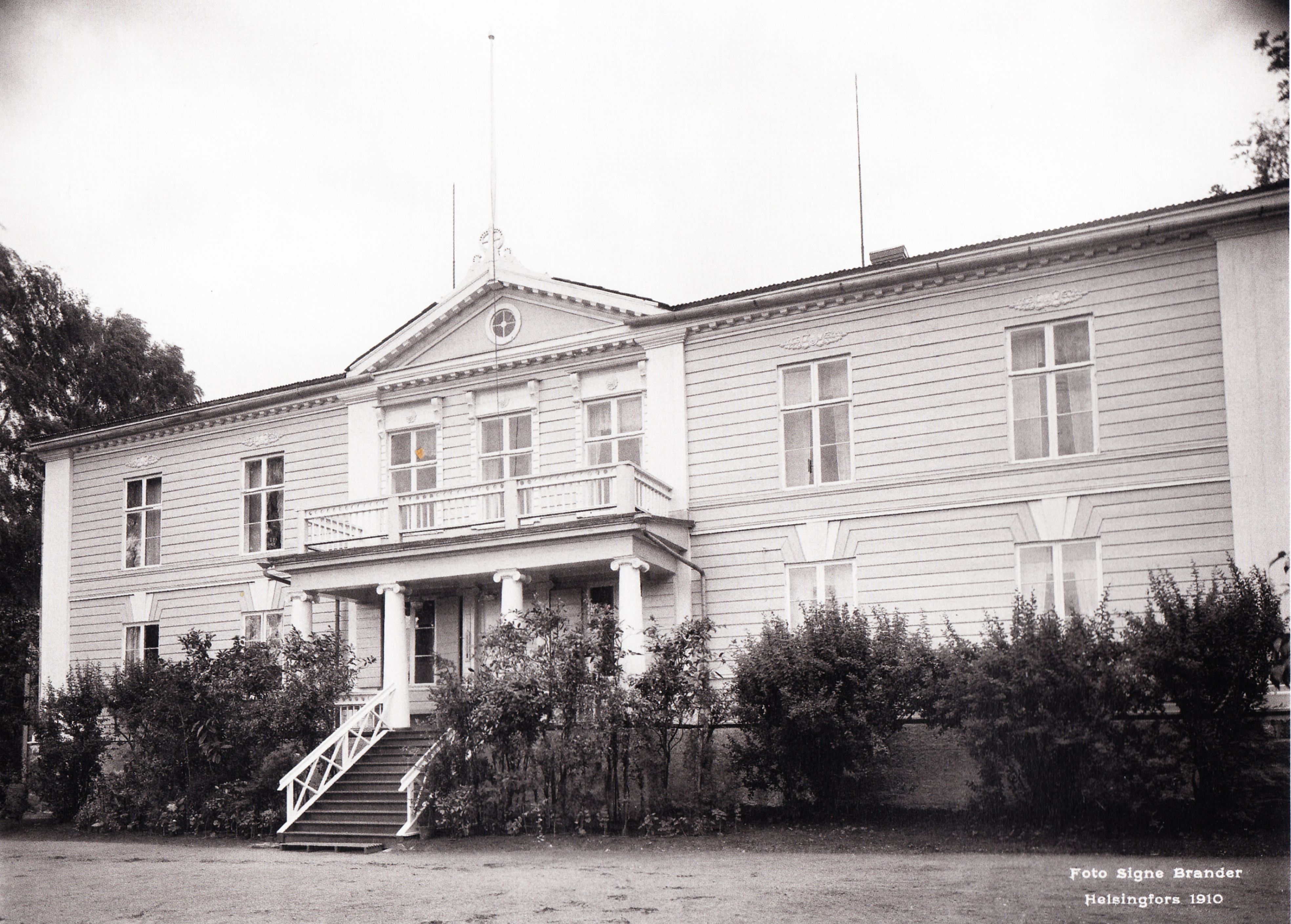 Gammelbackan kartano